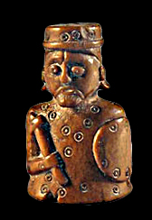 Цар з Бярэсця